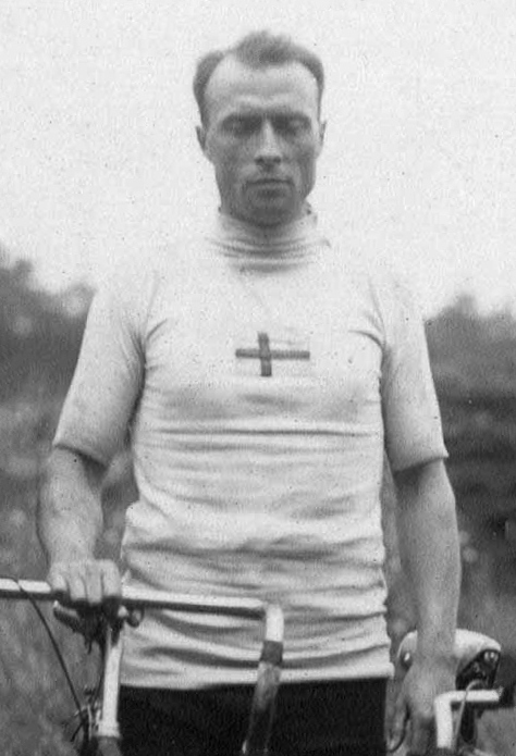 Axel Persson